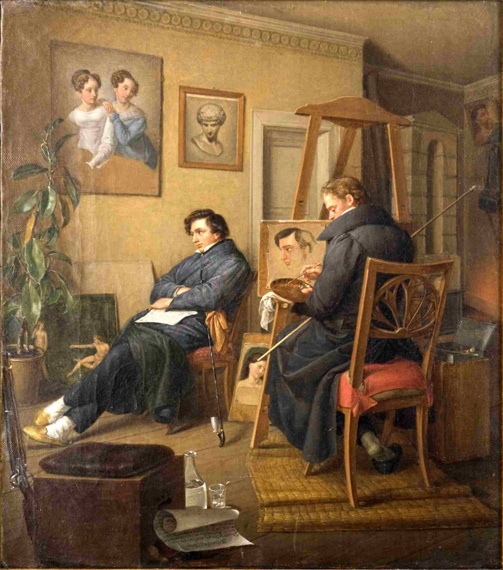 Selbstbildnis mit Hermann Matthäi, Dresden 1831